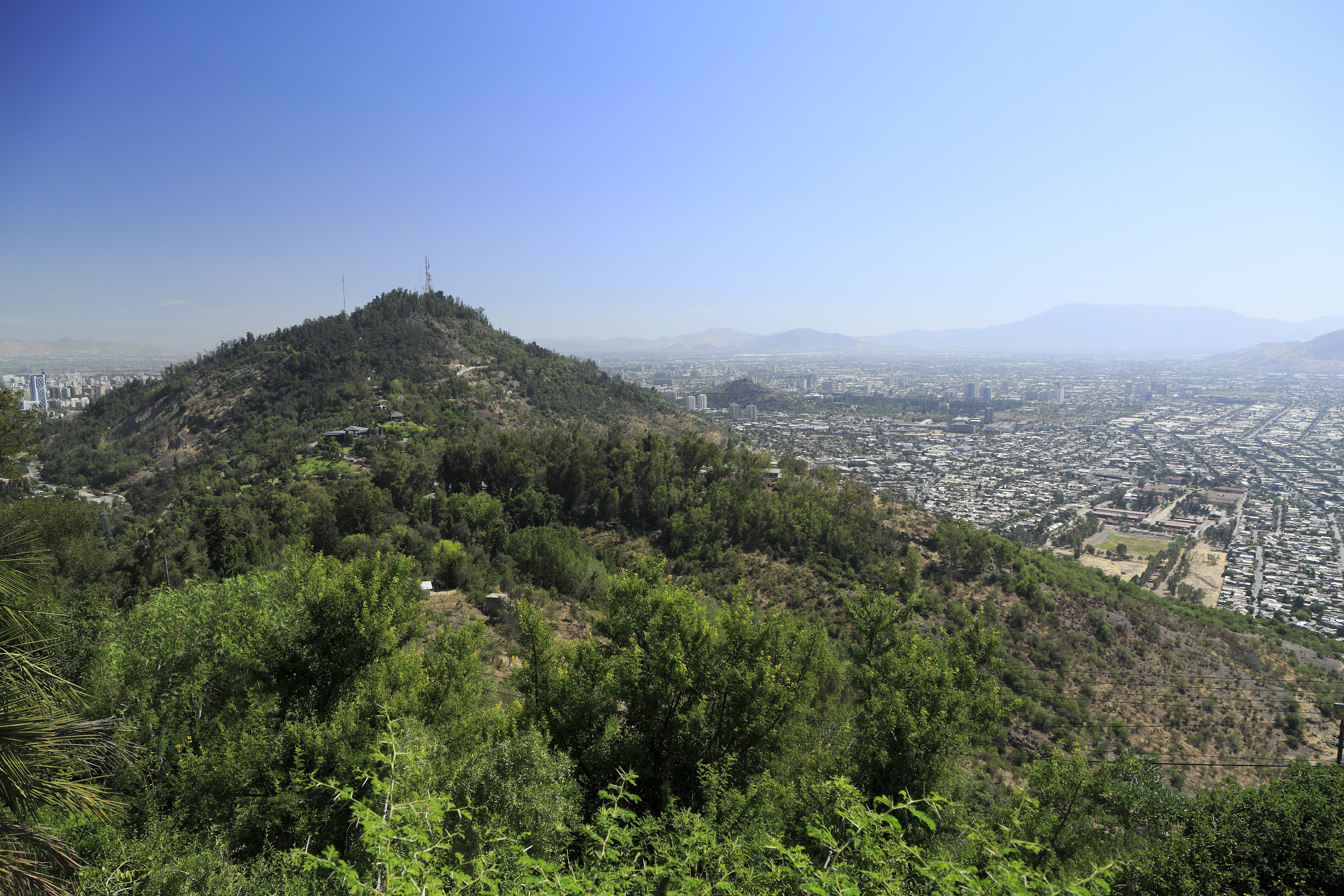 Richtung Südwesten mit dem Gipfel des Cerro San Cristóbal, der höchste Punkt ist der scheinbar niedrigerere links von der Sendeanlage.